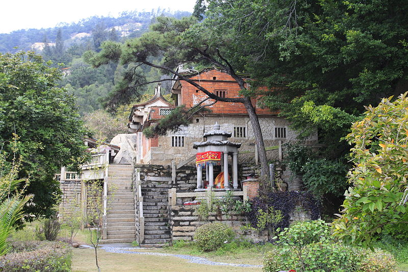 Храмът Чаоан в днешен Китай, който е построен от манихеи. Днес храмът е будистки.